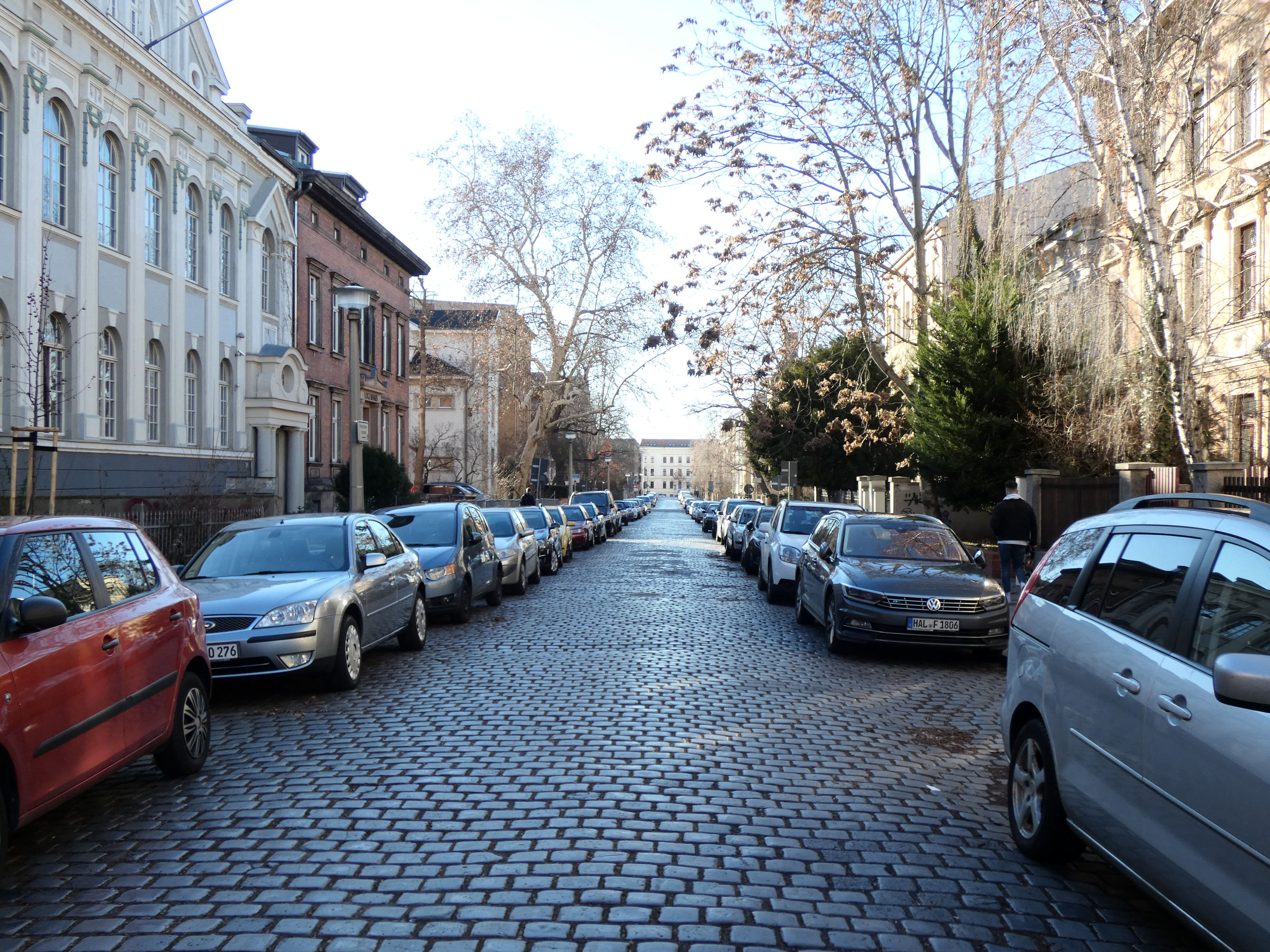 Heinrich-und-Thomas-Mann-Straße in Halle (Saale), Ansicht von der Adam-Kuckhoff-Straße nach Westen